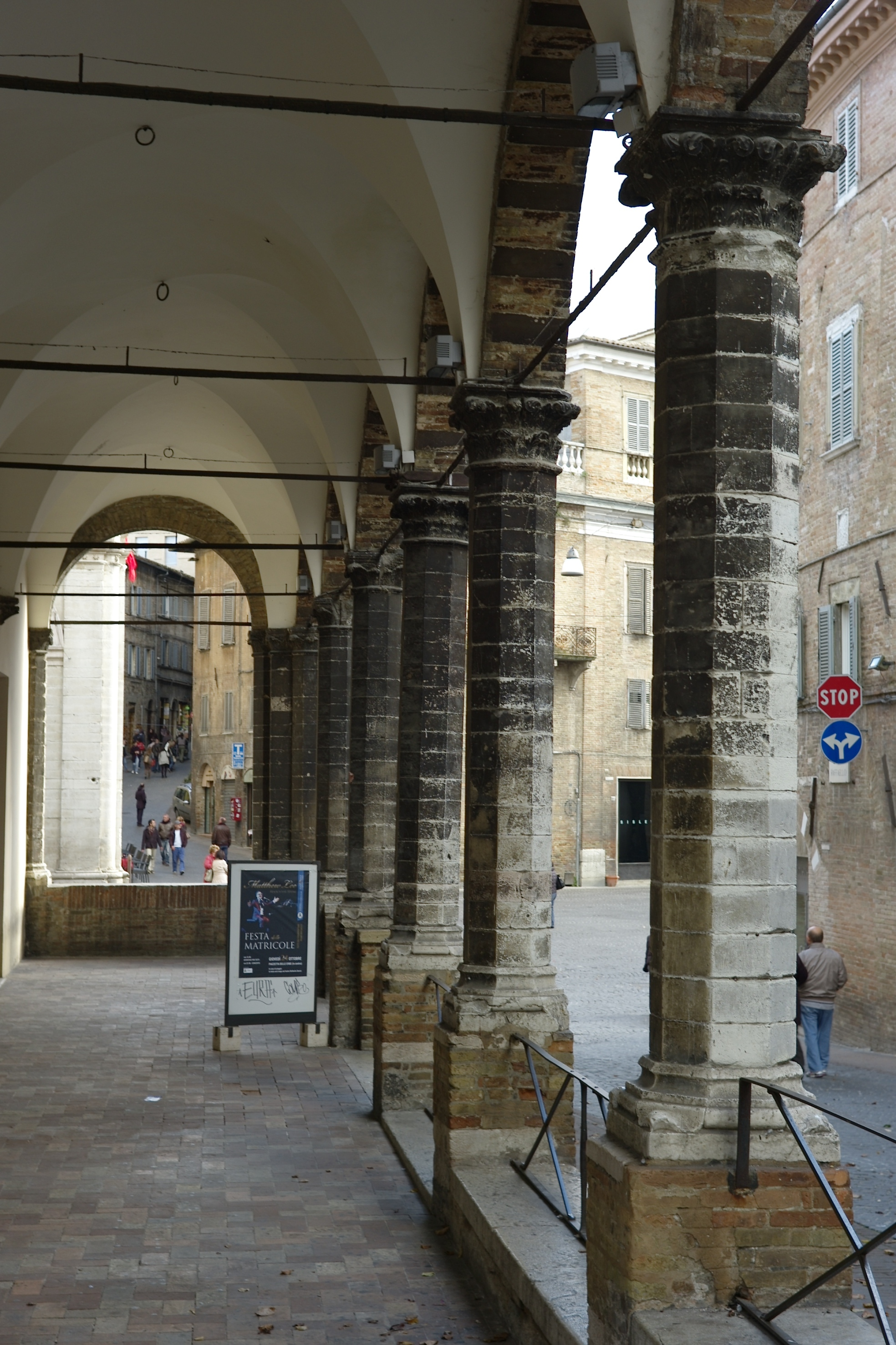 Il portico esterno, sulla facciata principale della Chiesa di San Francesco, in Urbino.